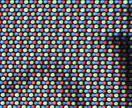 PC-Monitorbild (Ausschnitt)